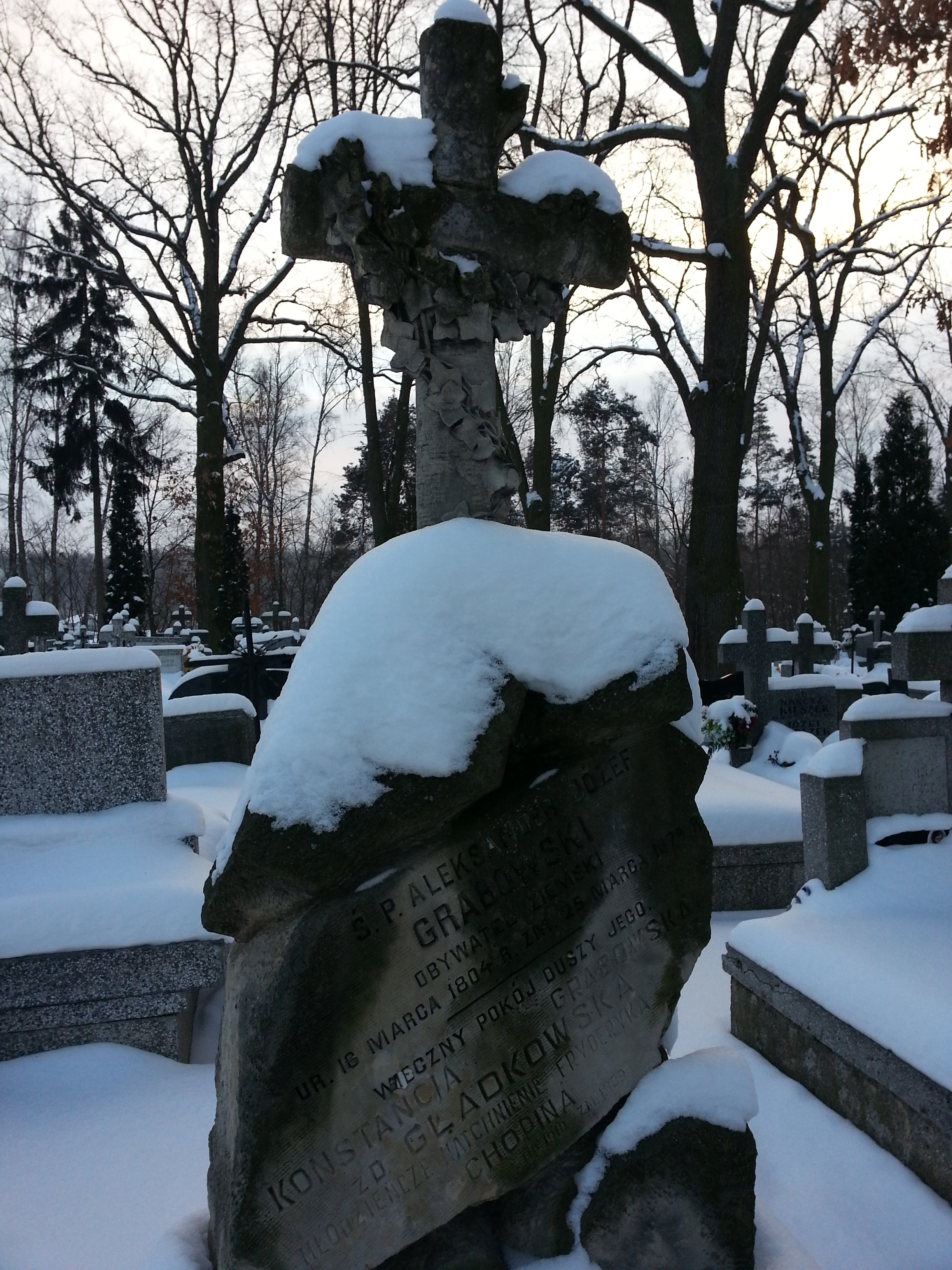 Babsk - cmentarz rzymskokatolicki, 1 poł. XIX, XX w., grób Konstancji Gładkowskiej